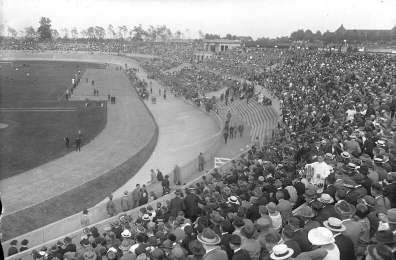 Das Entscheidungspiel um die deutsche Fußballmeisterschaft fand am 8. Juni unter Beteiligung von 35.000 Zuschauern zwischen F.F.C. Nürnberg (2:0) und Hamburger Sportverein im Deutschen Stadion statt. Blick auf die riesige Zuschauermenge während des Spieles.